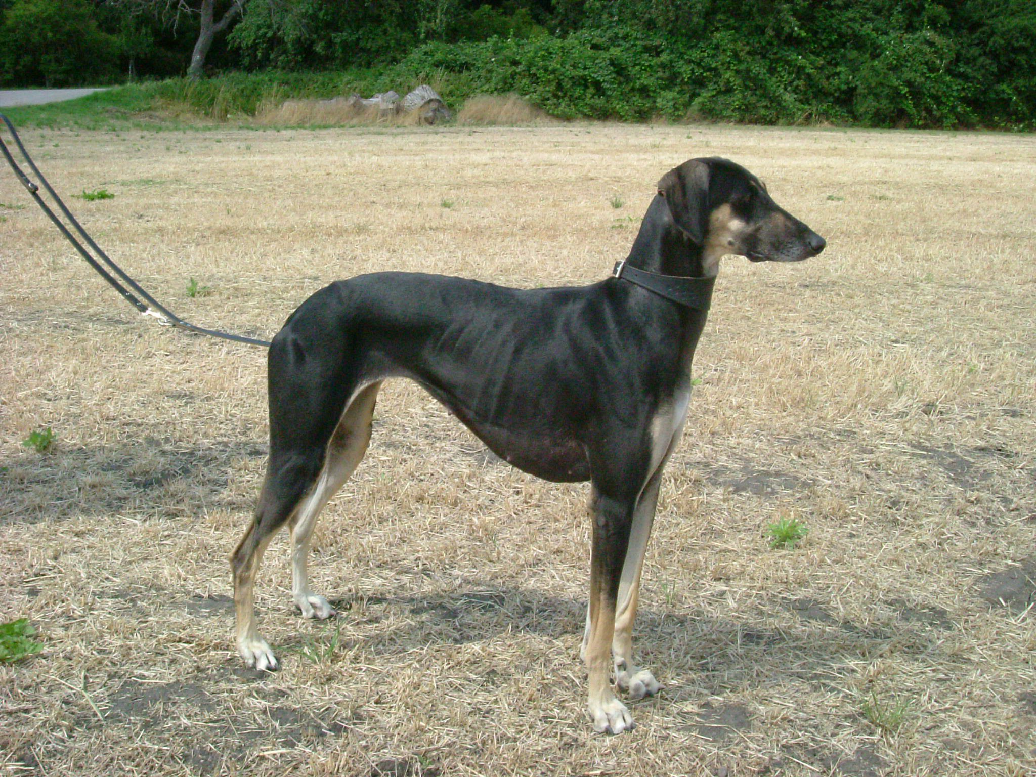 Sloughi - Arabischer Windhund